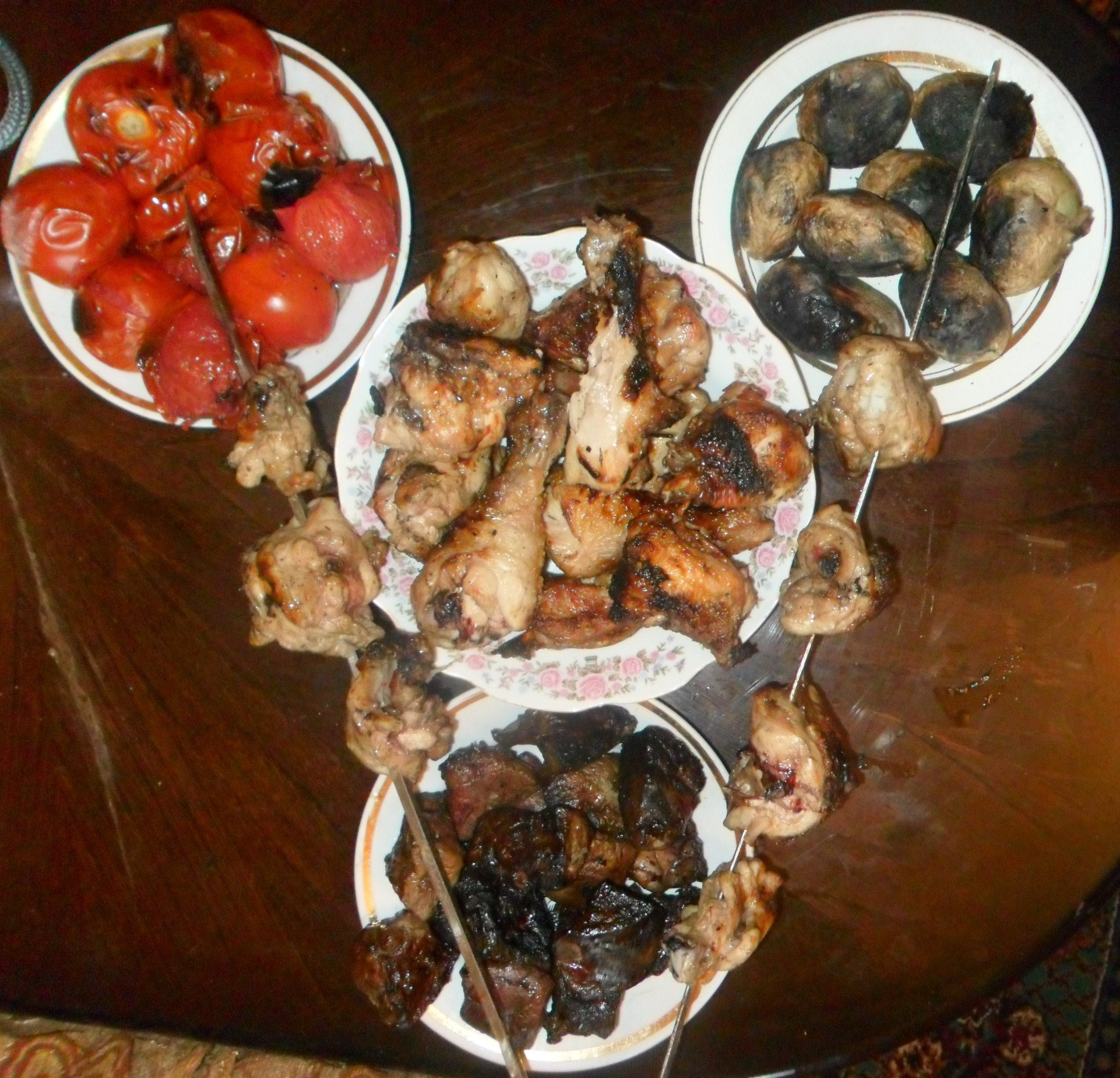 Toyuq, ciyər, pomidor, kartof kababları